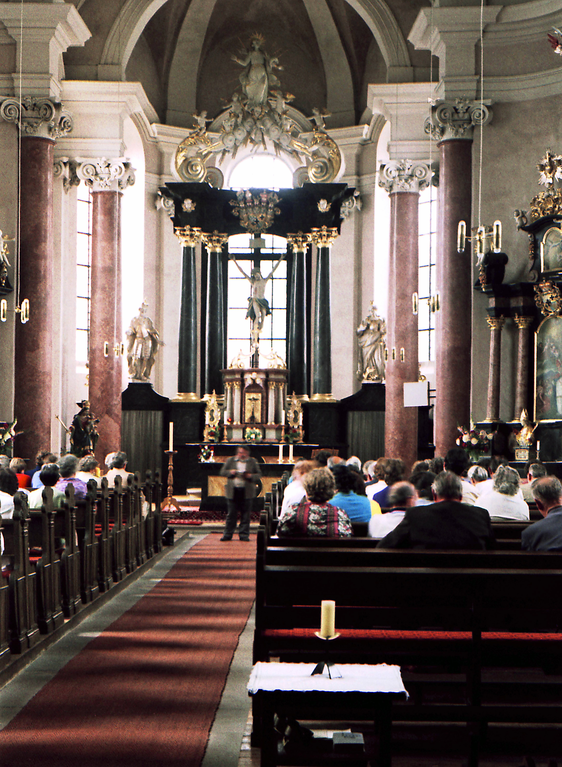 06.07.1985 DDR 6201 [36452] Zella/Rhön: Probsteikirche Mariä Himmelfahrt (GMP: 50.673308,10.109352). Einschiffiger Barockbau (1715-1732). Geht auf die Bautätigkeit der fuldaischen Äbte zurück. [F19850705A18.jpg]19850706436NR.JPG(c)Blobelt